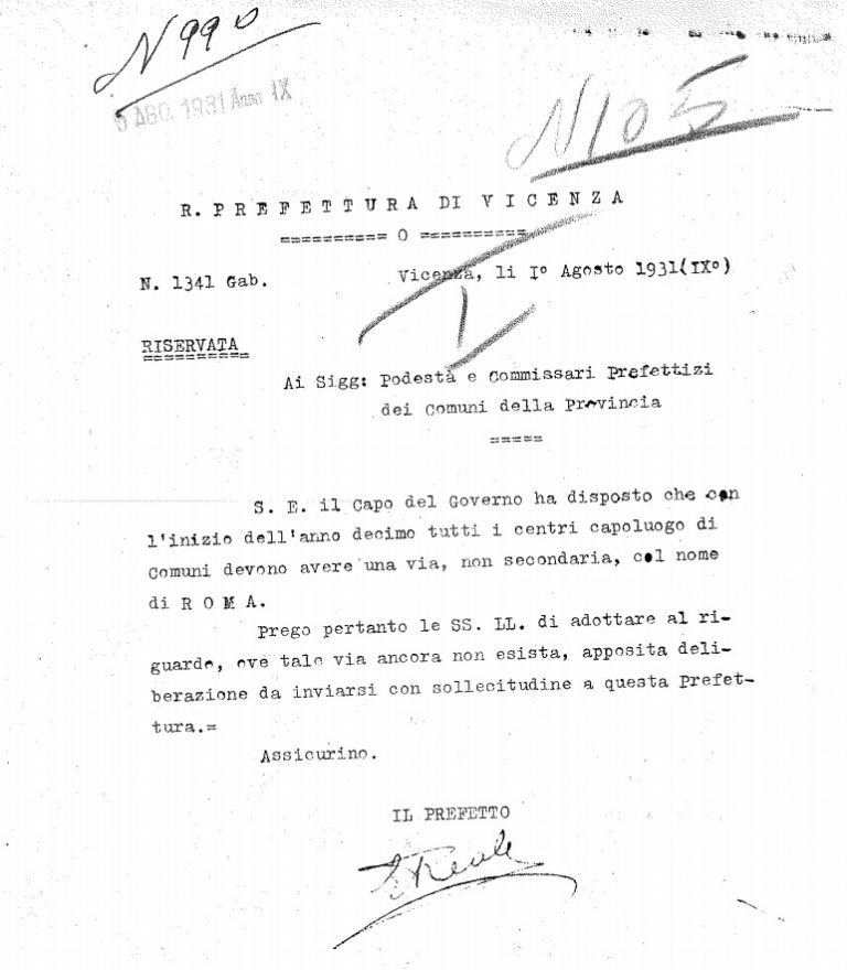 Prefettura di Vicenza - intitolazione viale Roma (1931)